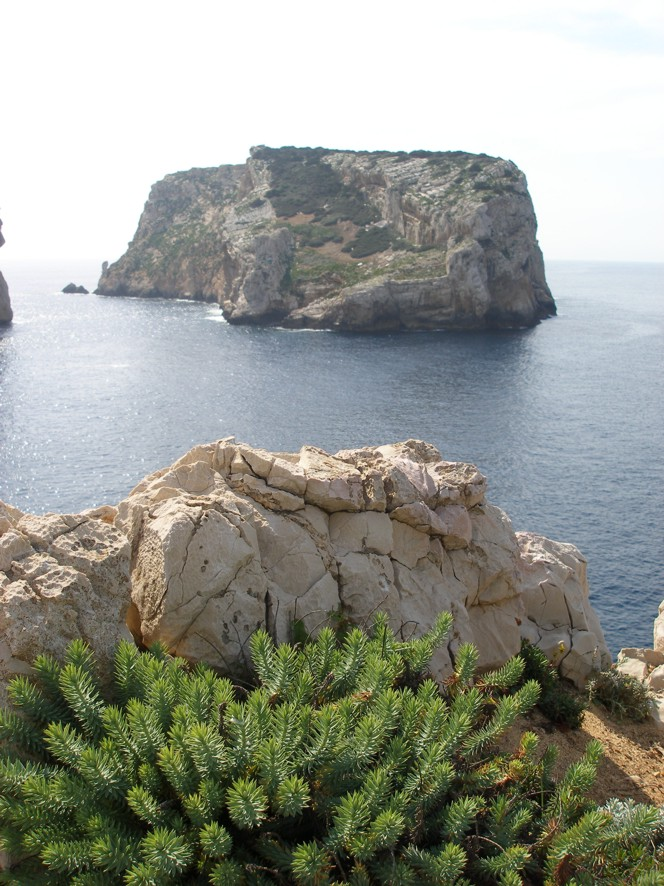 Vista panoramica dell'Isola Piana ad Alghero